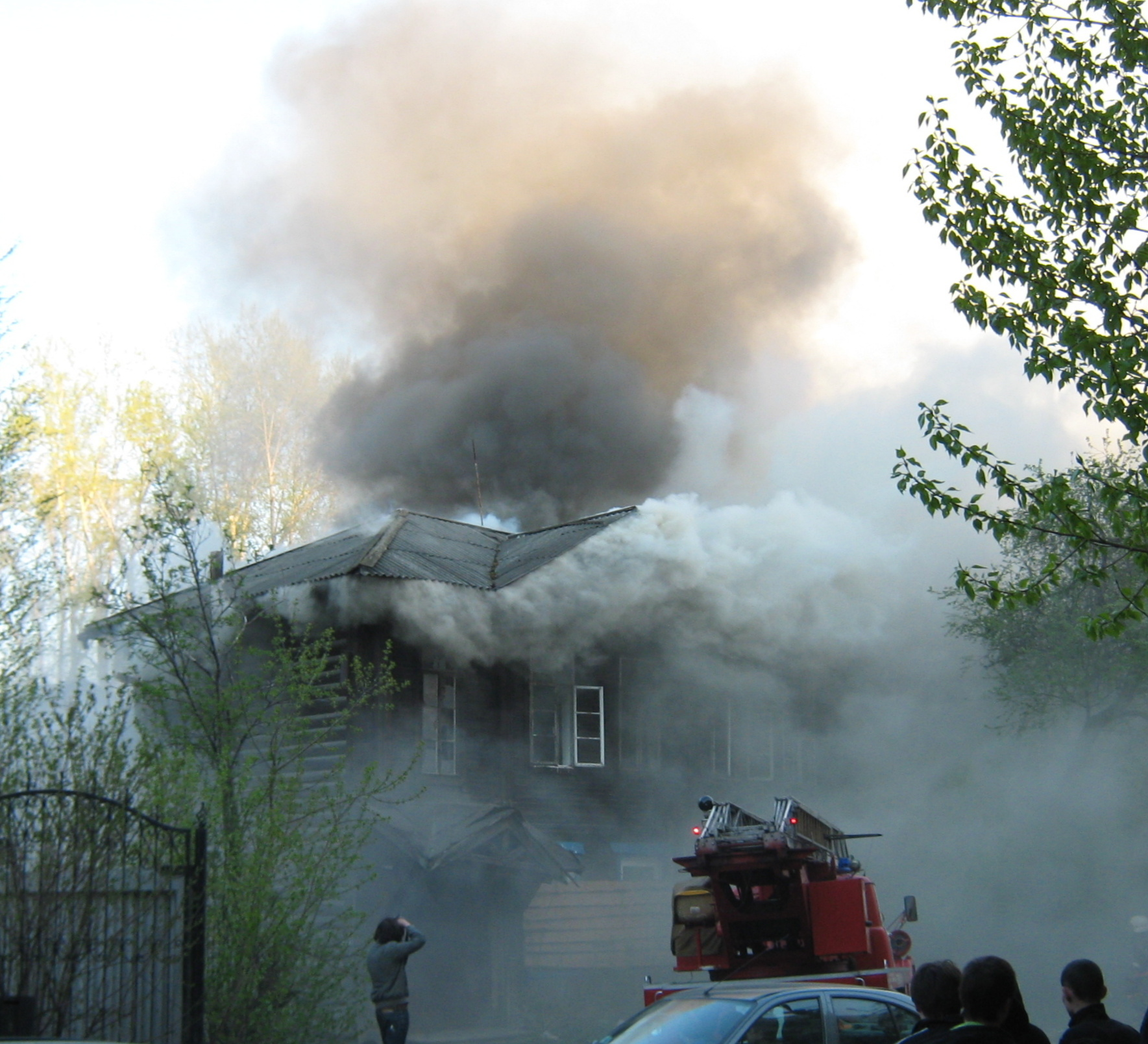 Советская 108, Томск. Пожар 13 мая 2009.